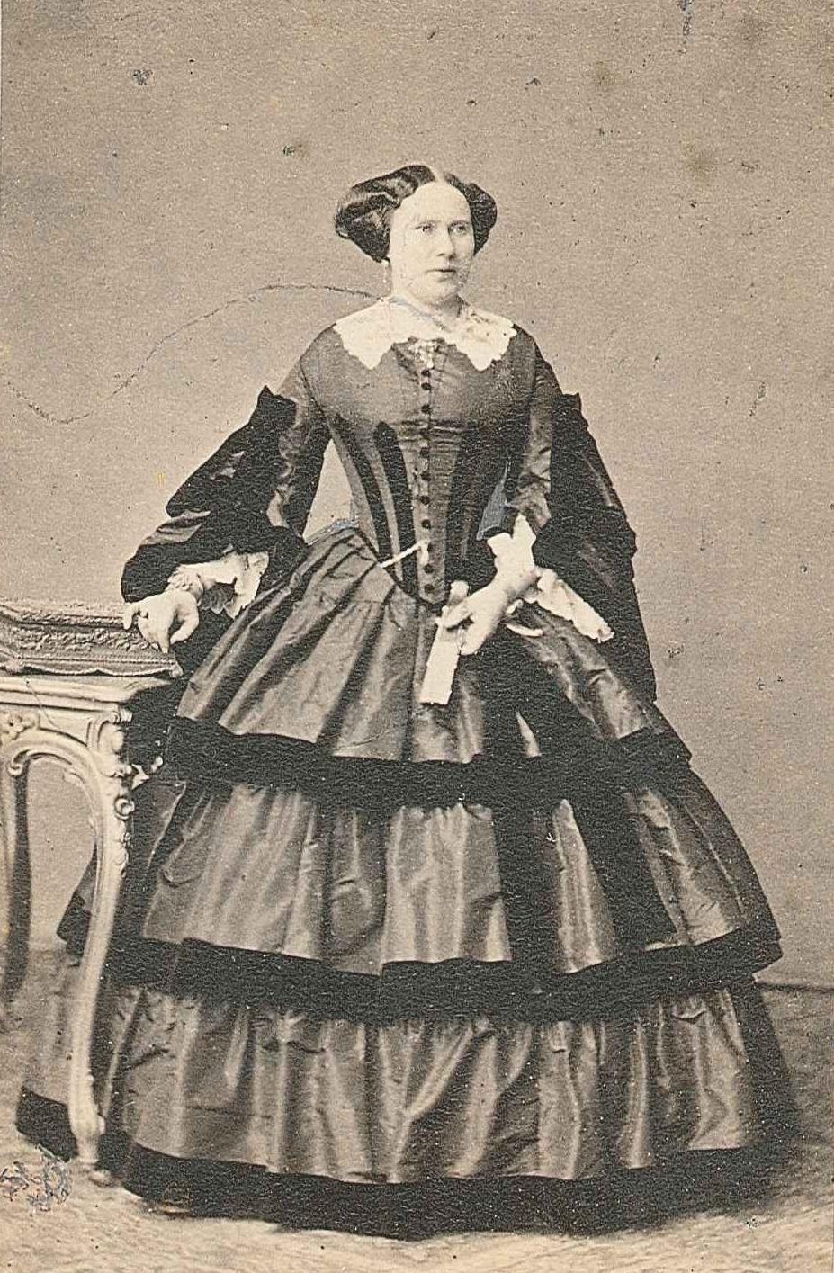 Prinzessin Katharina von Württemberg (1821-1898), Mutter des Königs Wilhelm II. von Württemberg.